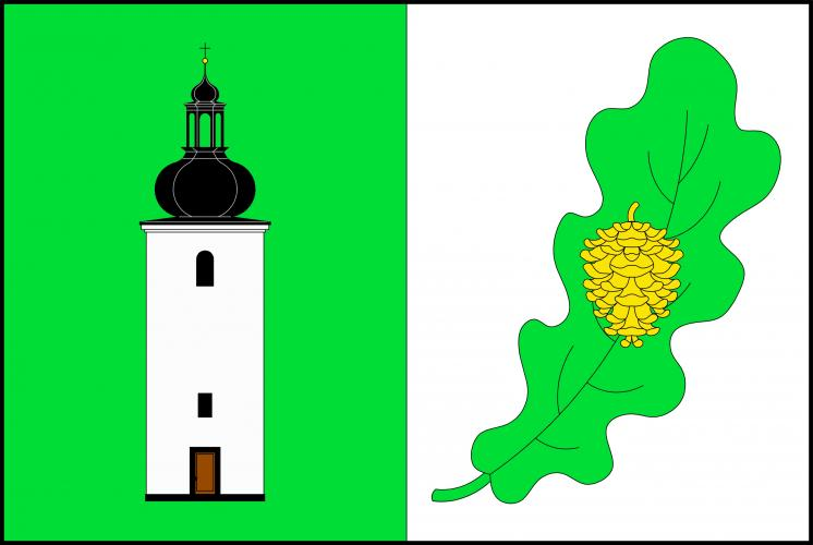 vlajka, Licibořice, okres Chrudim